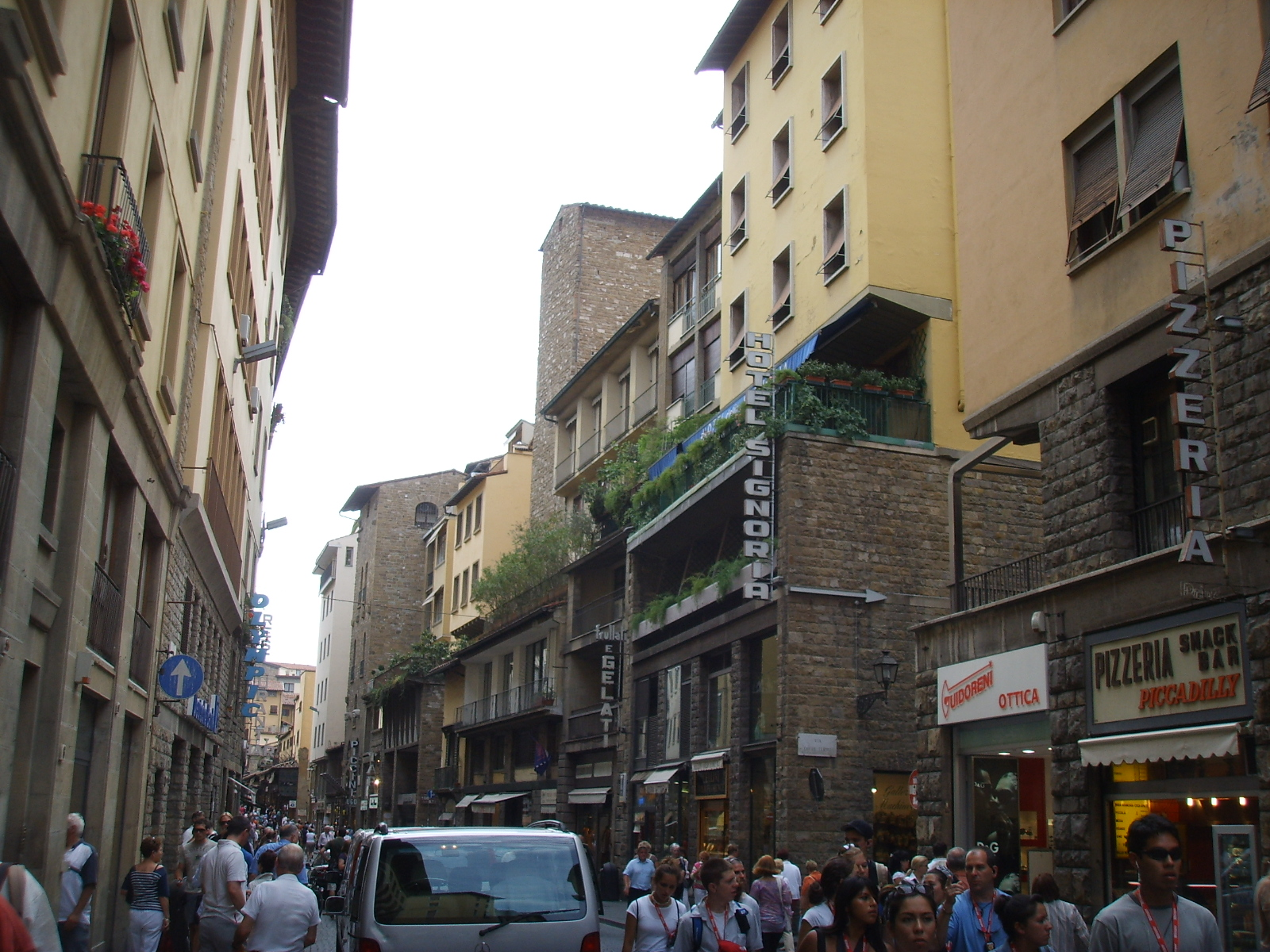 Via por santa maria